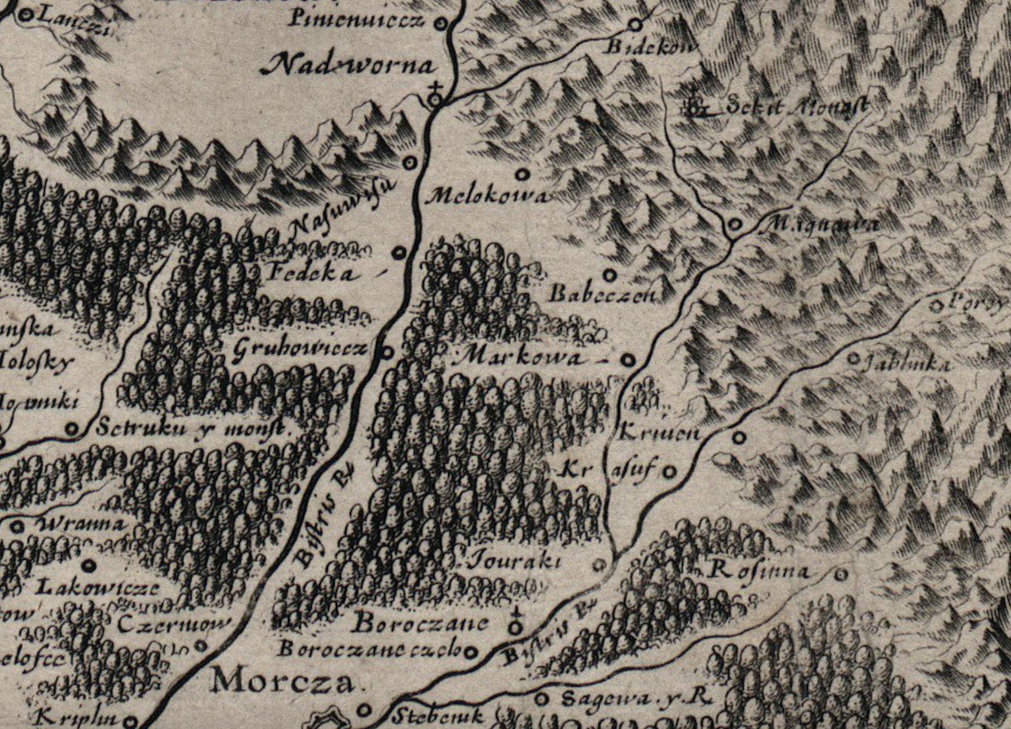 Вирізка з карти Боплана 1650-го року